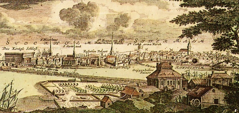 Stockholm från Kungsholmen, kolorerat kopparstick, med Gripenhielmska malmgården till höger (del av panorama)